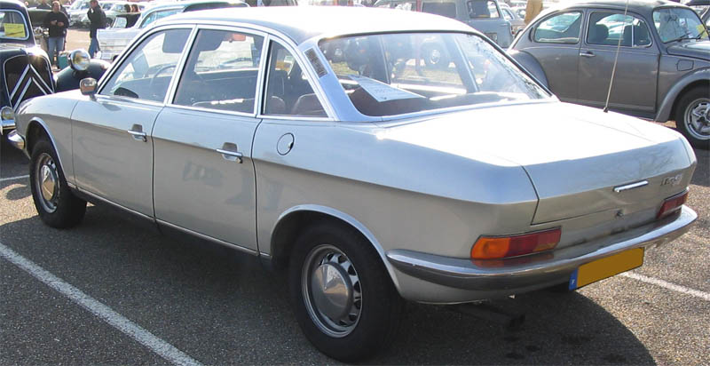 photographie d'une automobile NSU Ro 80 prise lors d'un rassemblement automobile